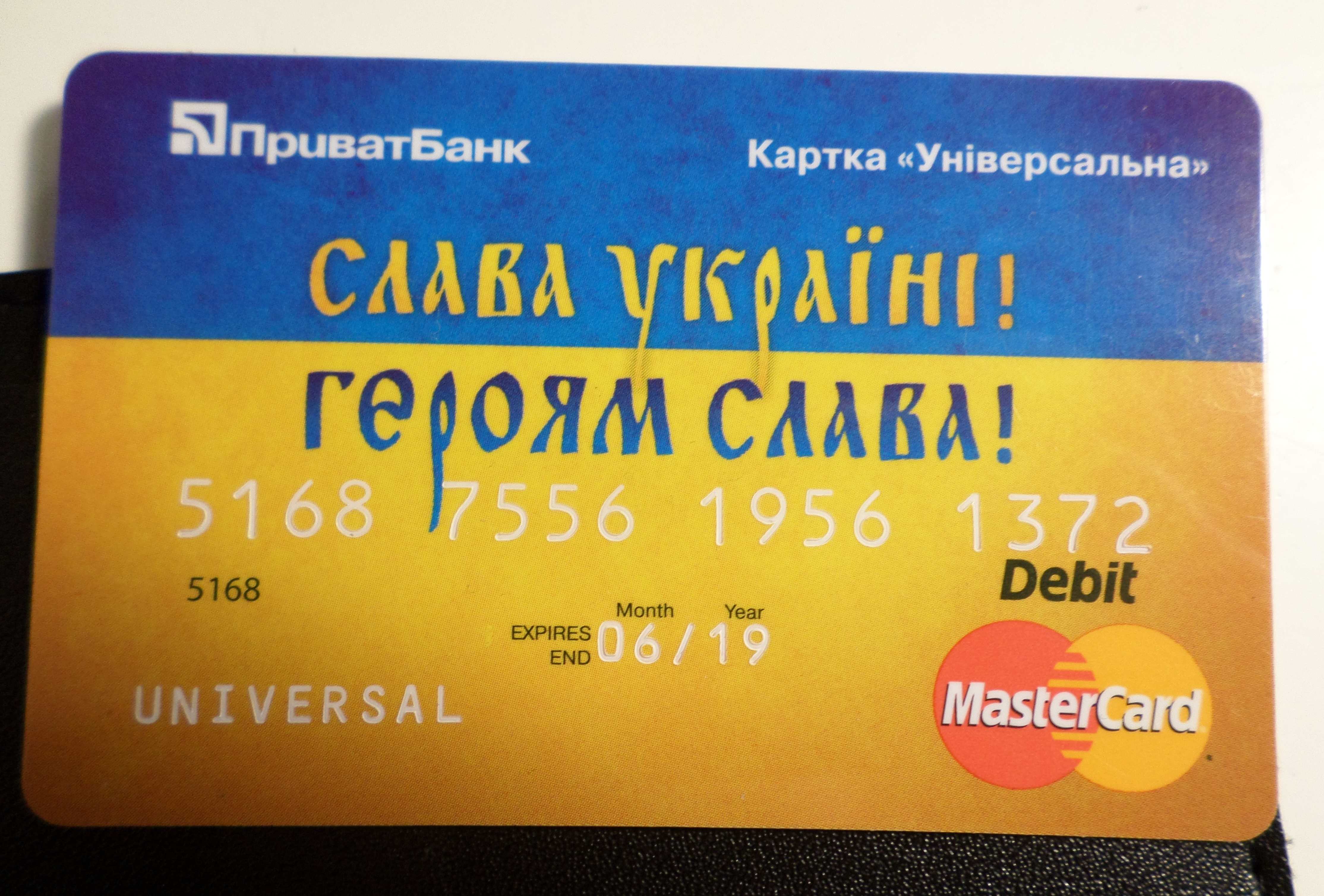 Картка Універсальна з новим дизайном від ПриватБанку